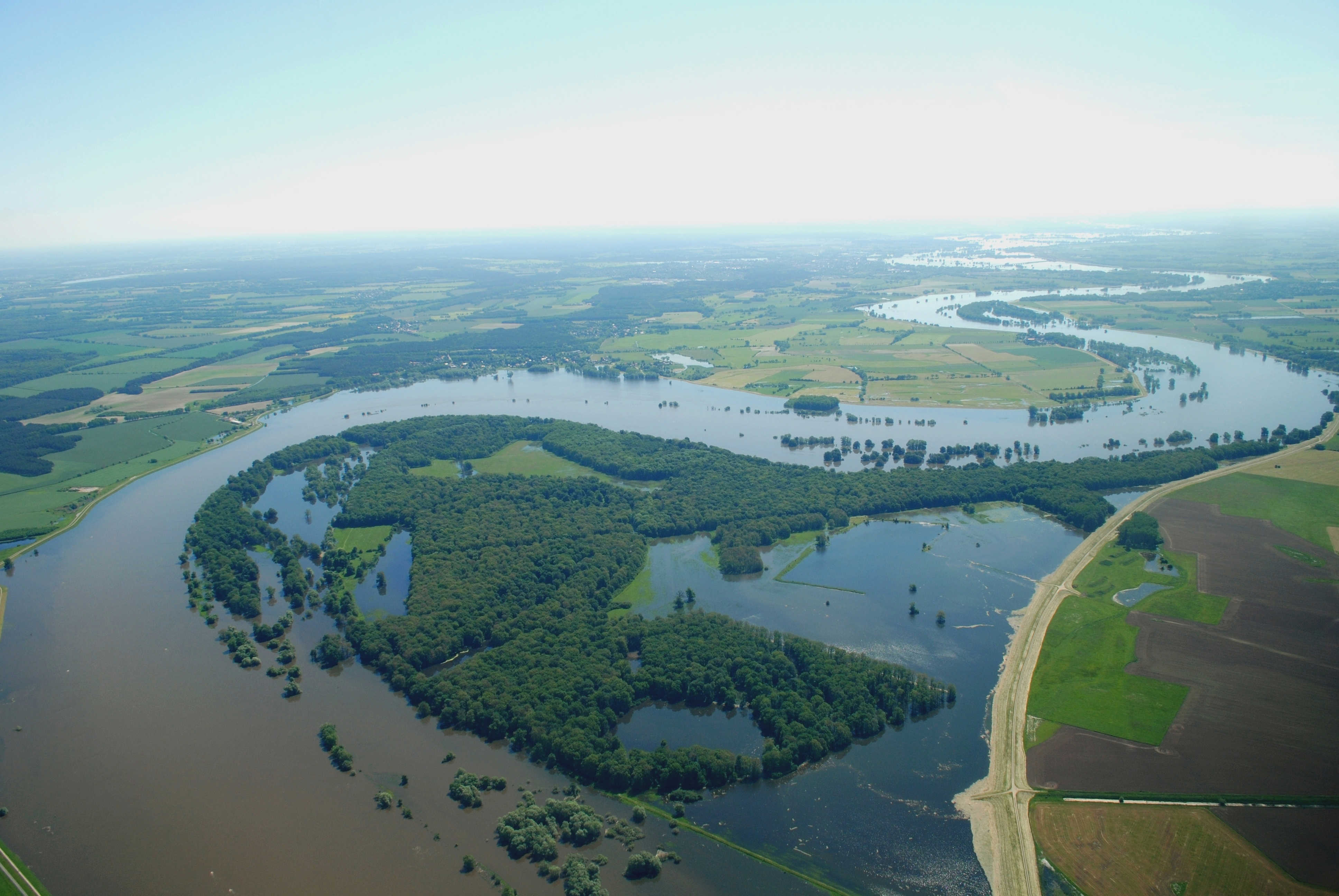 Elbe bei Hochwassser im Biosphärenreservat Flusslandschaft Elbe